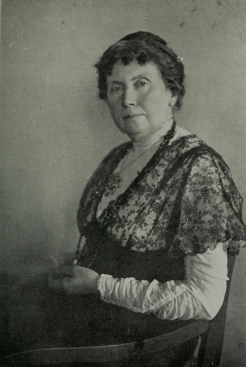 Isolde Kurz, German writer.